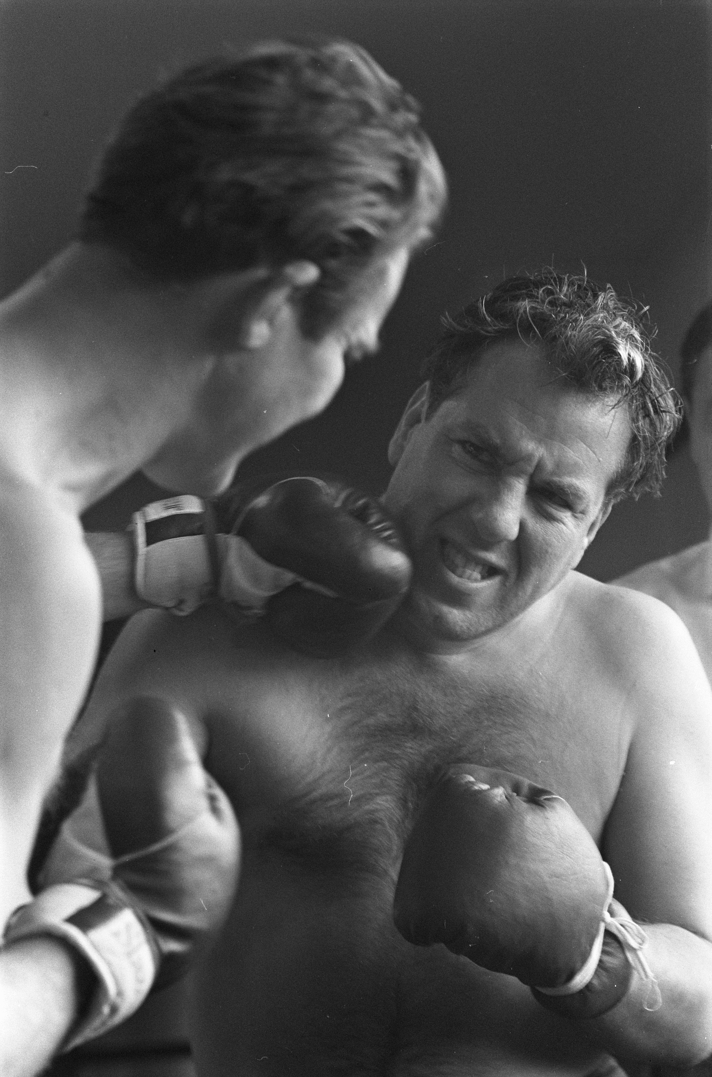 Collectie / Archief : Fotocollectie Anefo Reportage / Serie : [ onbekend ] Beschrijving : Ko van Dijk traint voor zijn rol in "Requiem van een zwaargewicht" Ko van Dijk en Harry Bos (l) Datum : 12 november 1959 Trefwoorden : boksen, trainingen Persoonsnaam : Dijk, Ko van, Harry Bos Fotograaf : Pot, Harry / Anefo Auteursrechthebbende : Nationaal Archief Materiaalsoort : Negatief (zwart/wit) Nummer archiefinventaris : bekijk toegang 2.24.01.05 Bestanddeelnummer : 910-8160